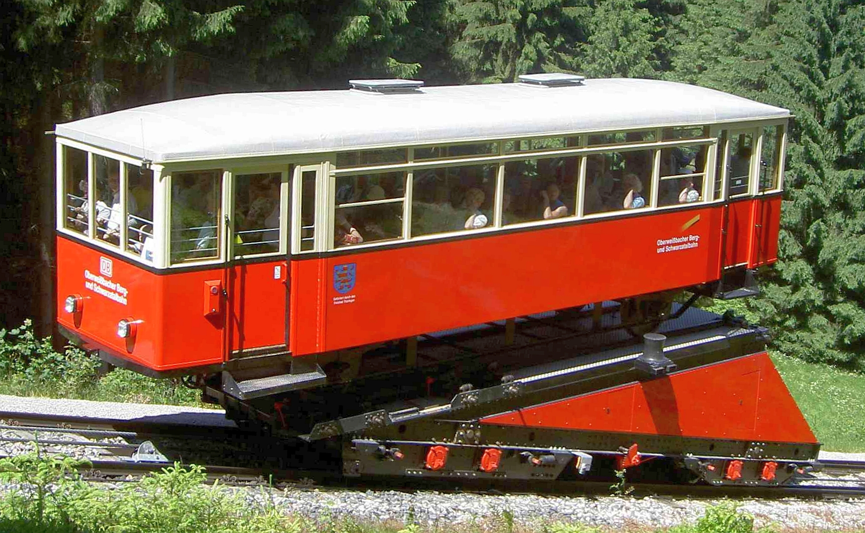 Güterbühne der Oberweißbacher Bergbahn, aufgesetzt der ehemalige Beiwagen No. 3 der Schleizer Kleinbahn AG, danach EB 188 513 der DR